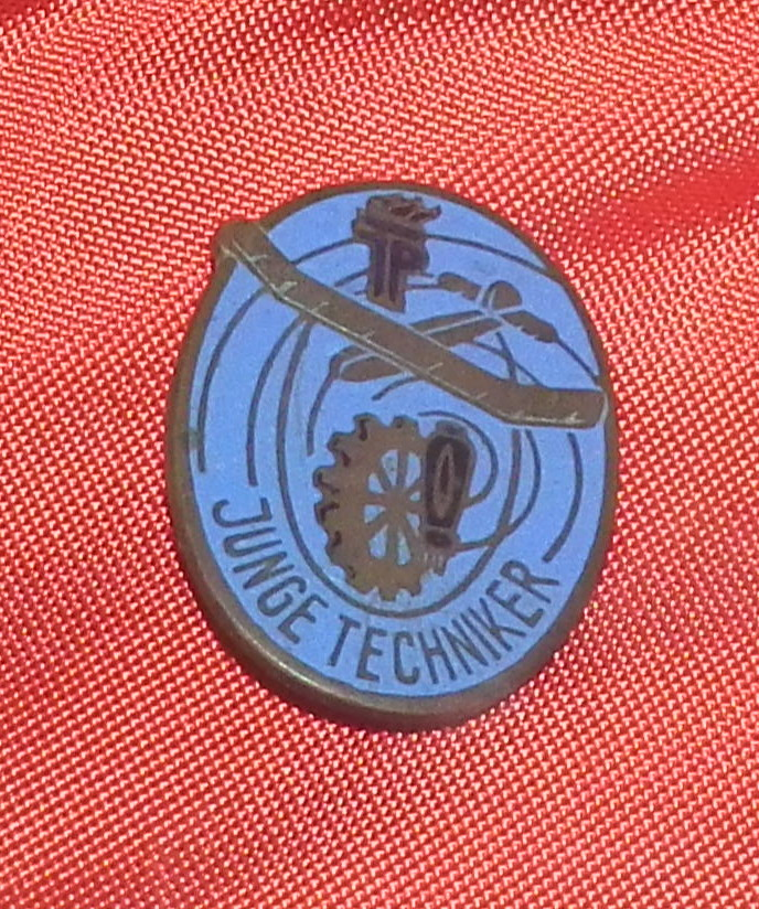 Anstecker Junge Techniker, Veröffentlicht mit Genehmigung der Museumsleitung